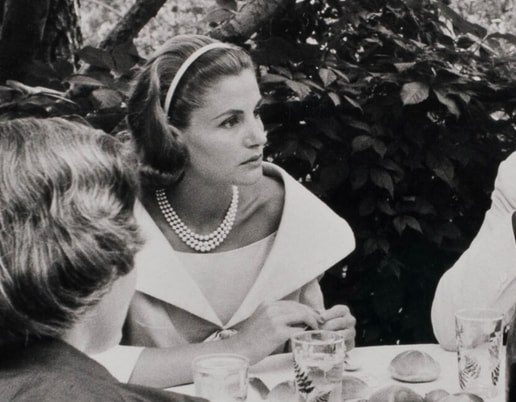 تبين الصورة اللبنانية مي عريضة عام 1965